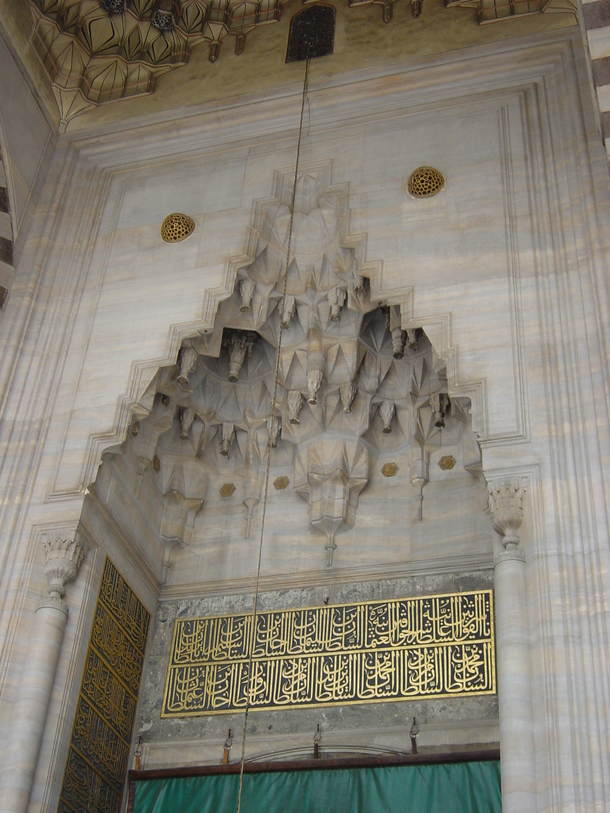 Muqarna stalattiti decorative sopra il portone d'ingresso della Moschea di Solimano il Magnifico ad Istanbul. Foto di: Giovanni Dall'Orto, 26-5-2006.